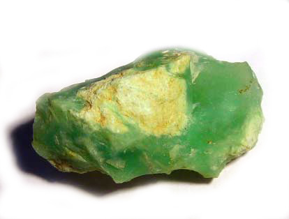 Хризопраз. Первый сорт.